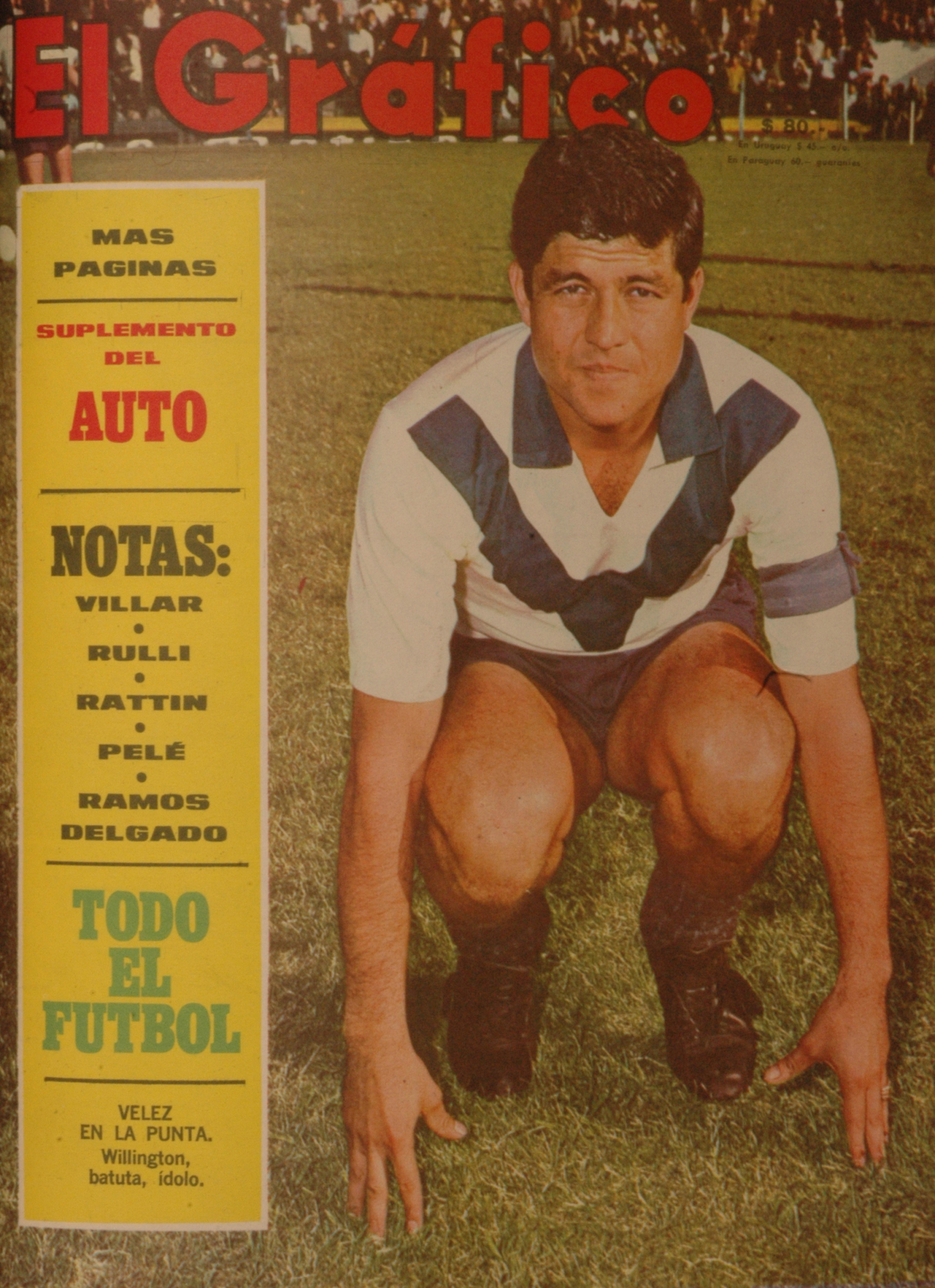 El Grafico del 16 de Abril de 1968. Edicion 2532